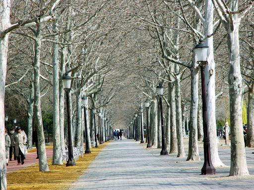 A Tagore sétány Balatonfüreden télen